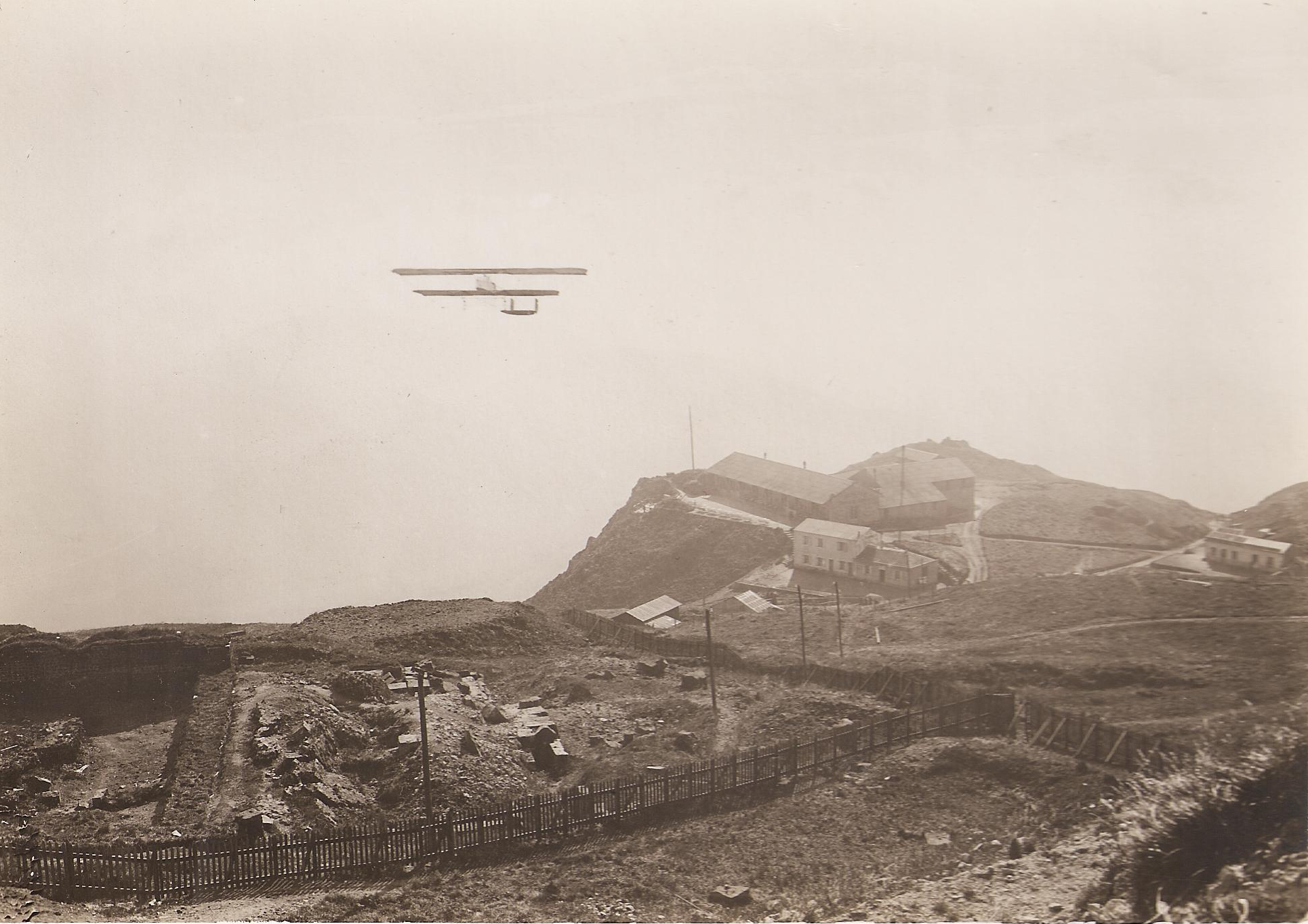 Eugène Renaux à l'arrivée du Grand Prix Michelin d'Aviation